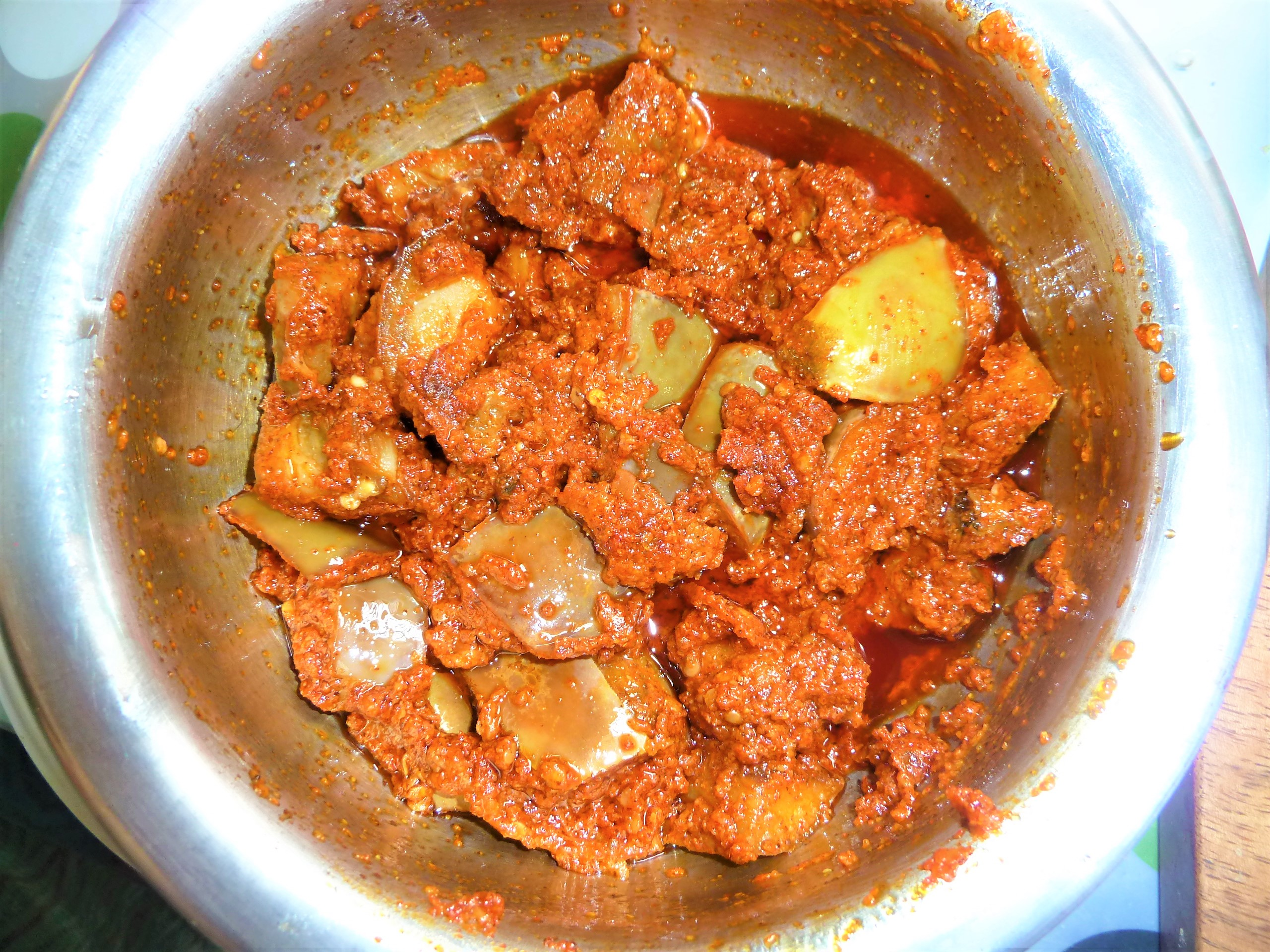 వంకాయ పచ్చడి (ఊరగాయ)